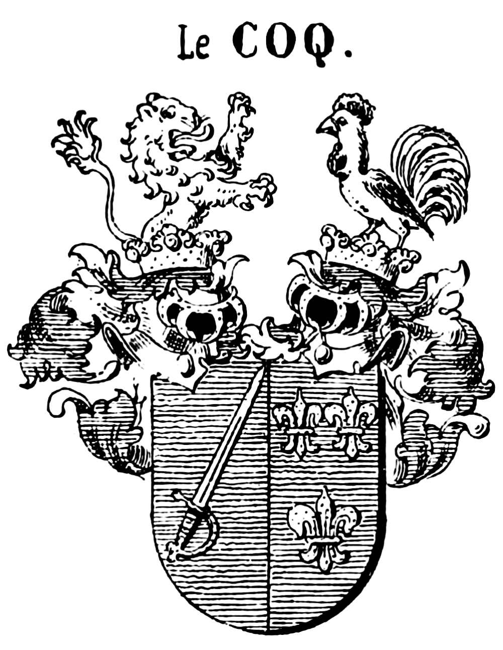 Wappen derer von Le Coq von 1775